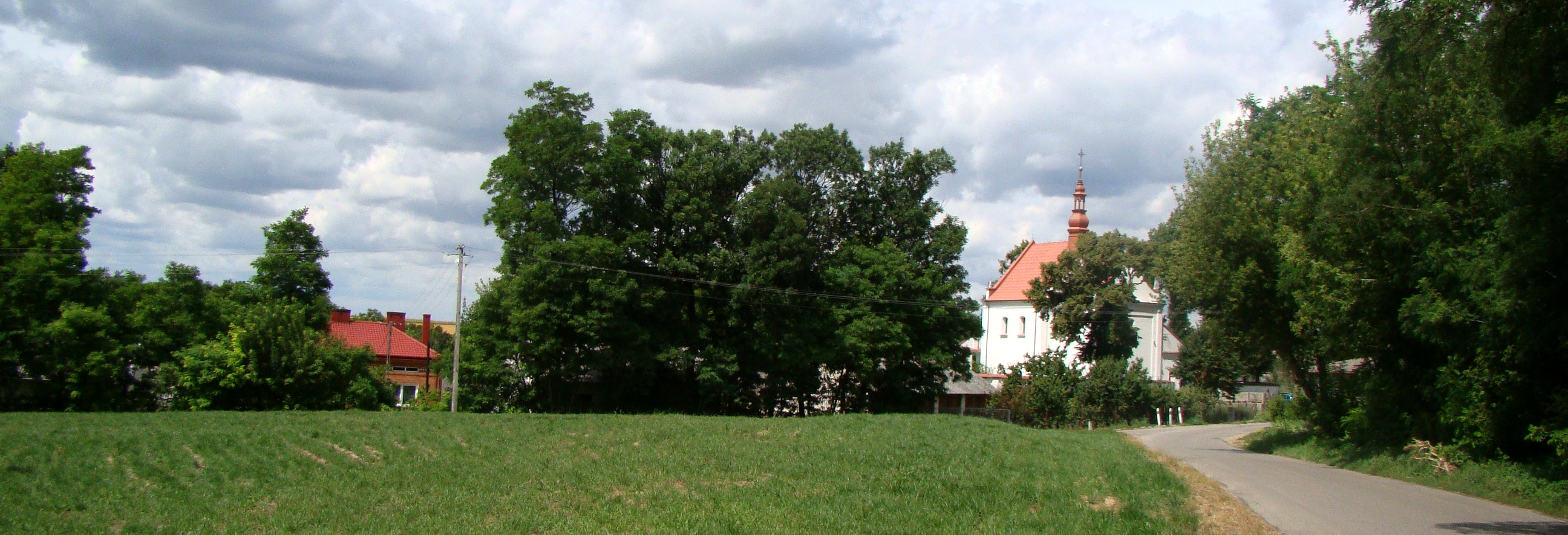 Widok na kościół w Łukawie